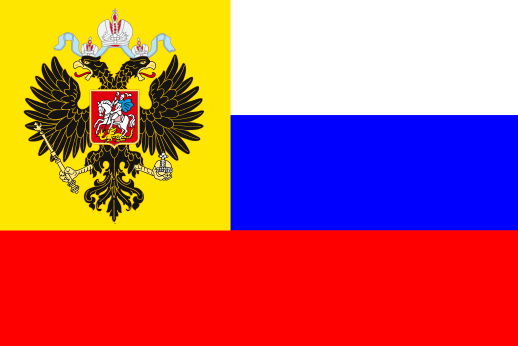 Флаг Российской империи для частного использования(1914-1917)